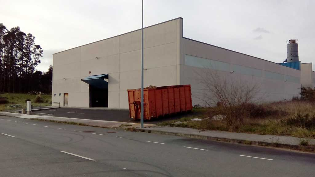 IDEA ProAudio en Cedeira